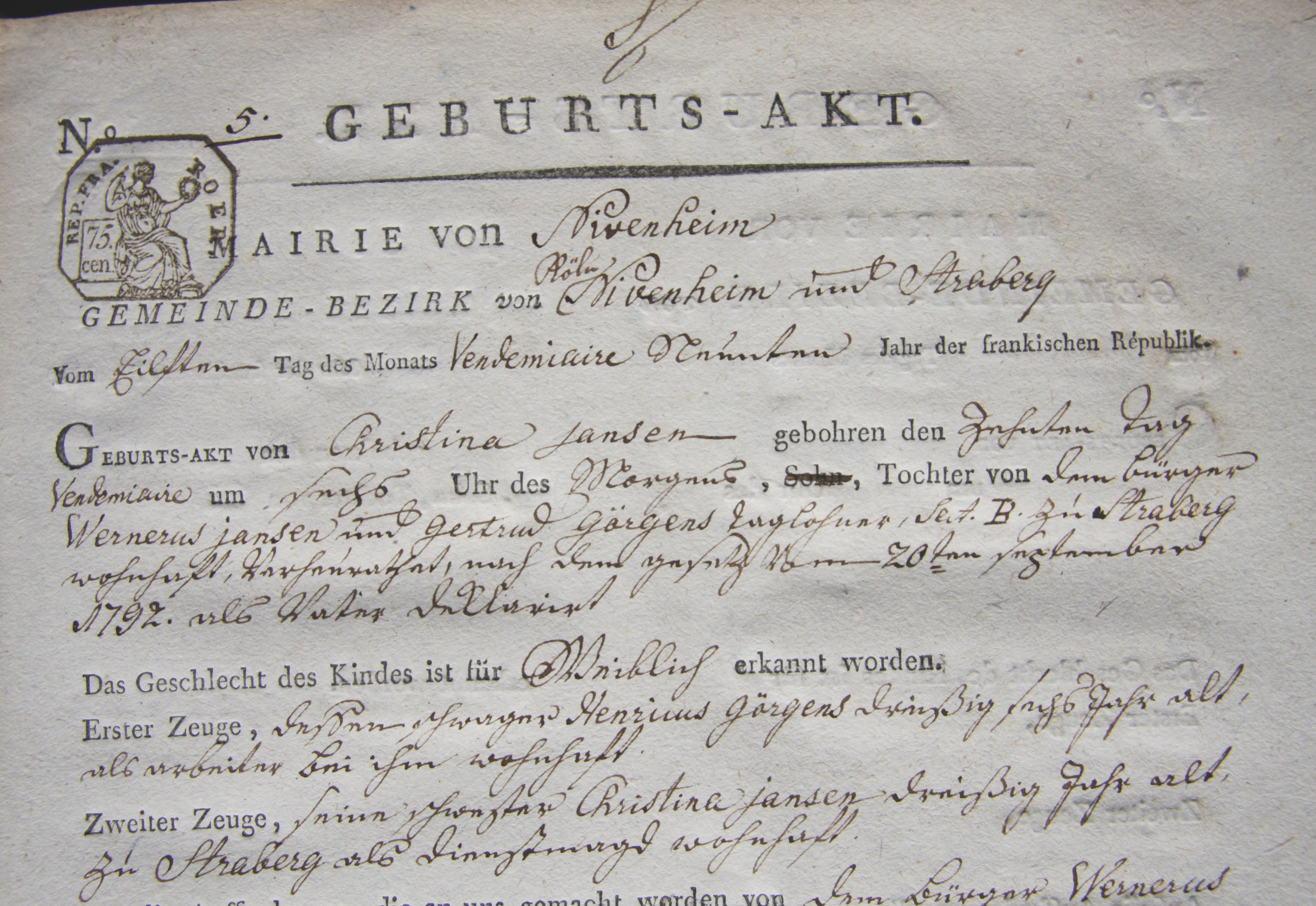 Geburtsregister Gemeinde Nievenheim (1802)